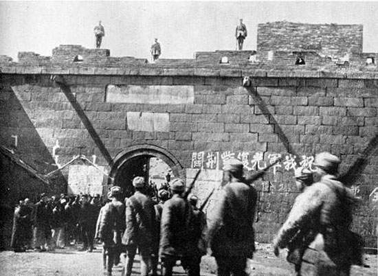 1944年，八路军再次光复紫荆关